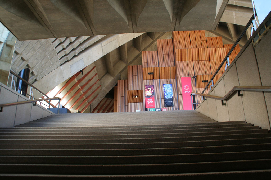 escaleras interiores del teatro de la ópera de Sydney